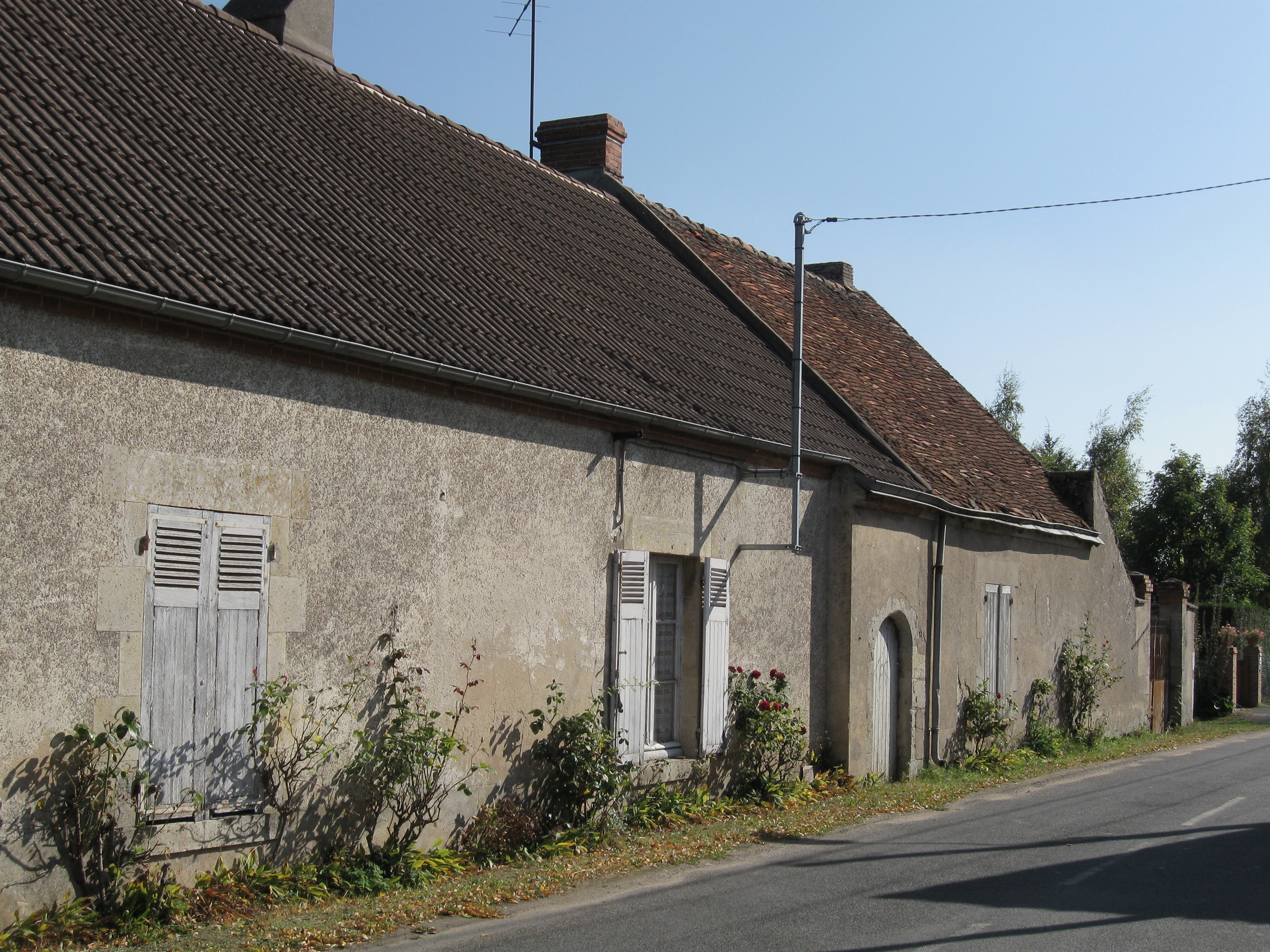 Rue d'Albœuf, Bou, Loiret, France